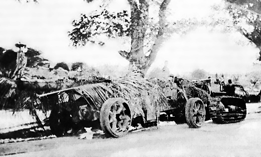 Alliierte Artilleriekanone 155 mm vom Typ GUN M1917 abgedeckt hinter einem Traktor (Philippinen - 1941)